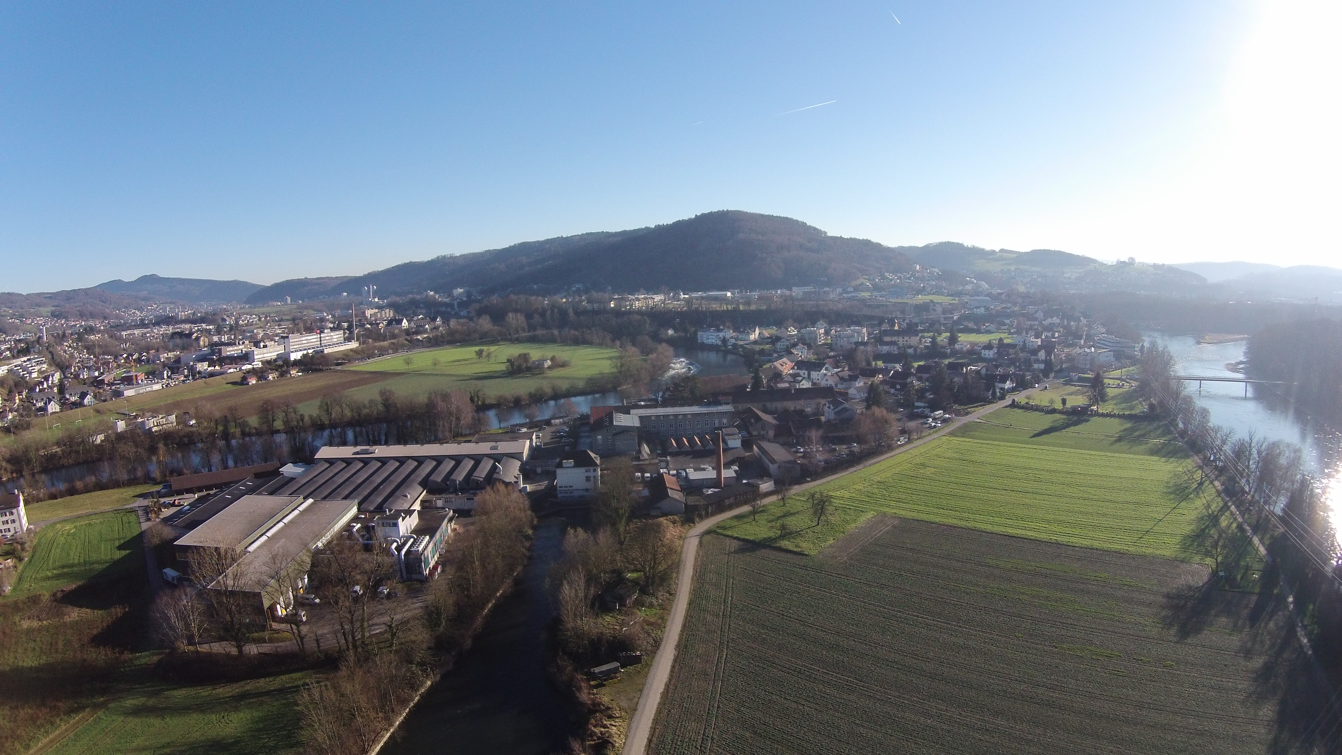 Blick aufs Wasserschloss und den Gebenstorfer Ortsteil Vogelsang